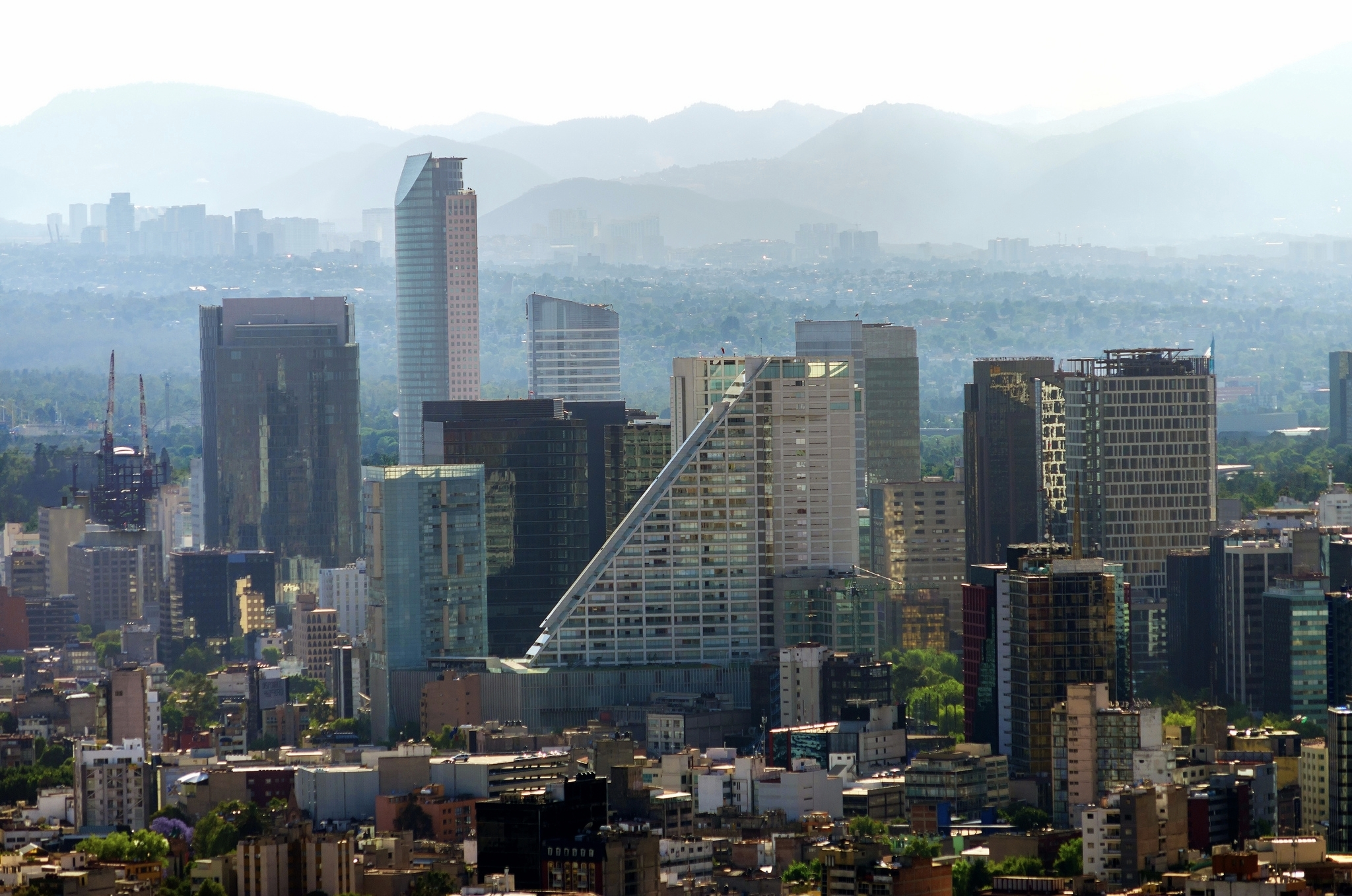 Paseo de la Reforma